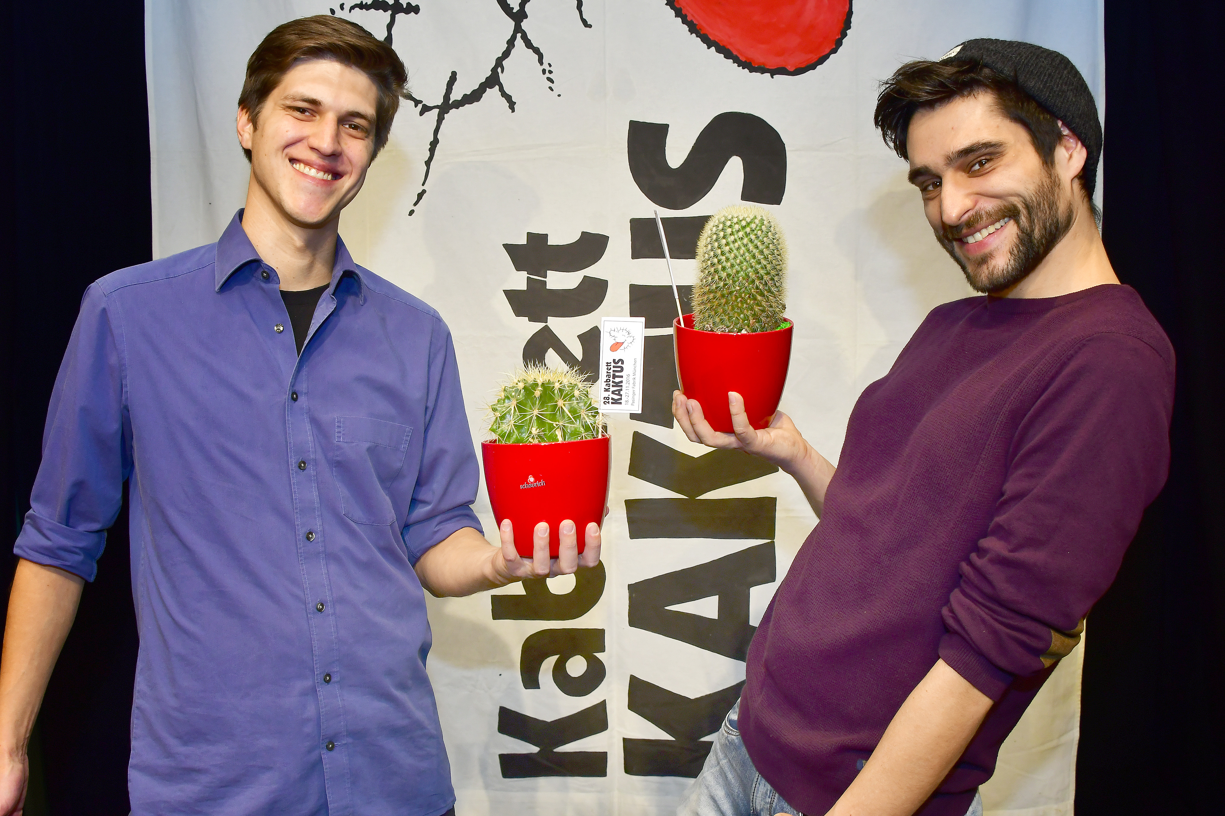 Falk Plücker und Nektarios Vlachopoulos, Kaktus-Sieger 2016